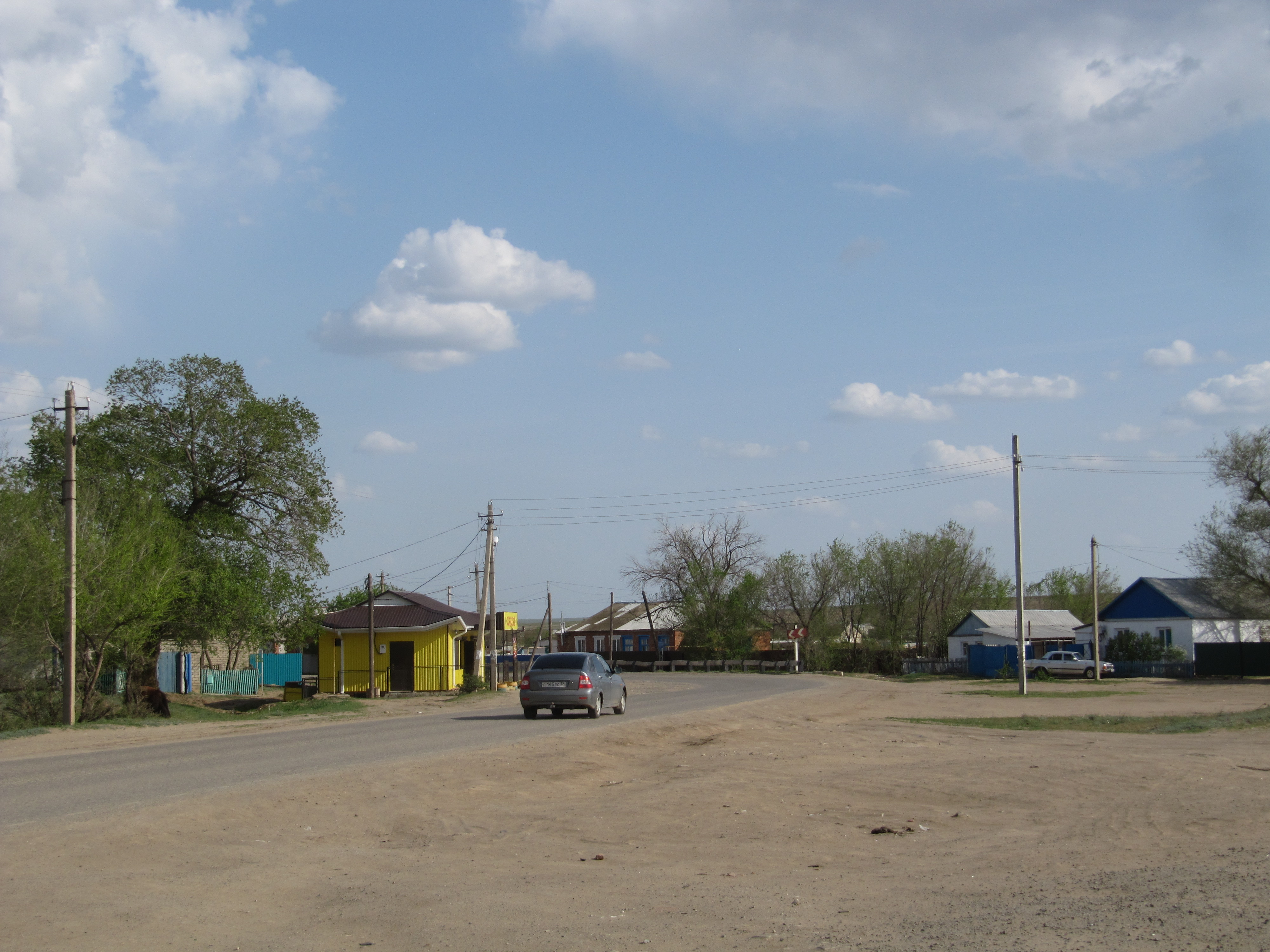 Кетченеры